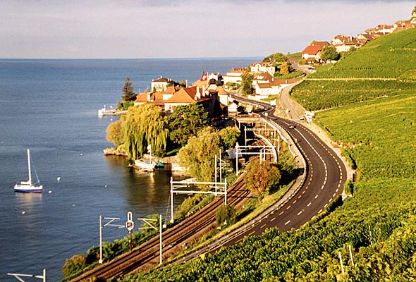 Genfersee bei Rivaz, in der Bildmitte am Seeufer das Château de Glérolles, im Hintergrund der zu Rivaz gehörende Weiler Sallaz.